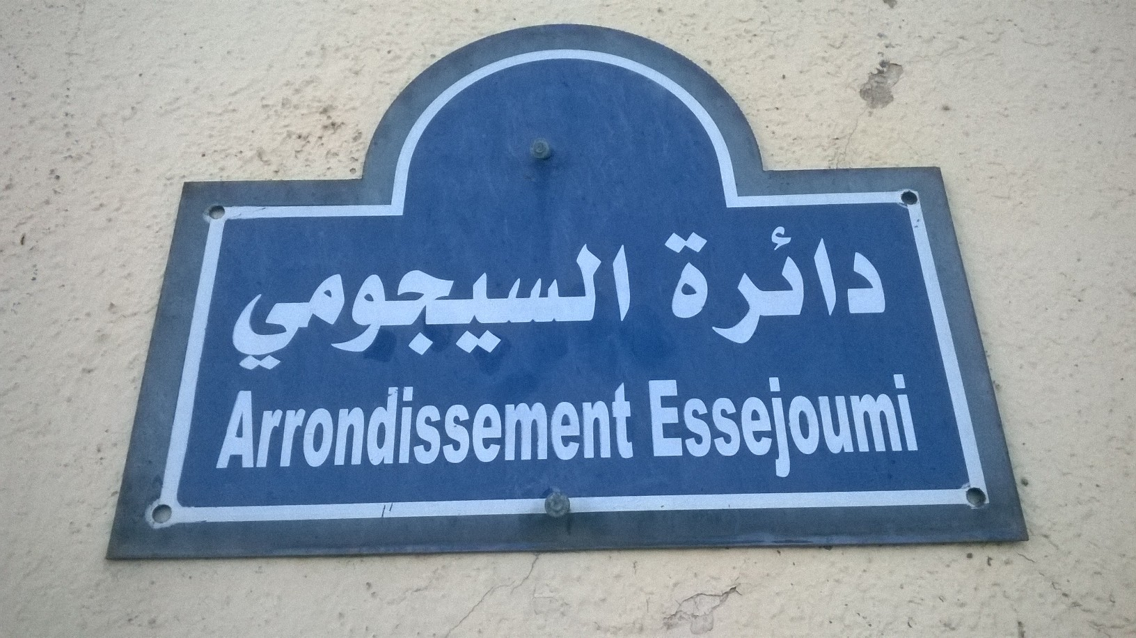 Tunis, Tunisie تونس العاصمة، تونس